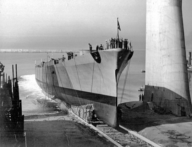 Il varo dell'incrociatore Cornelio Silla